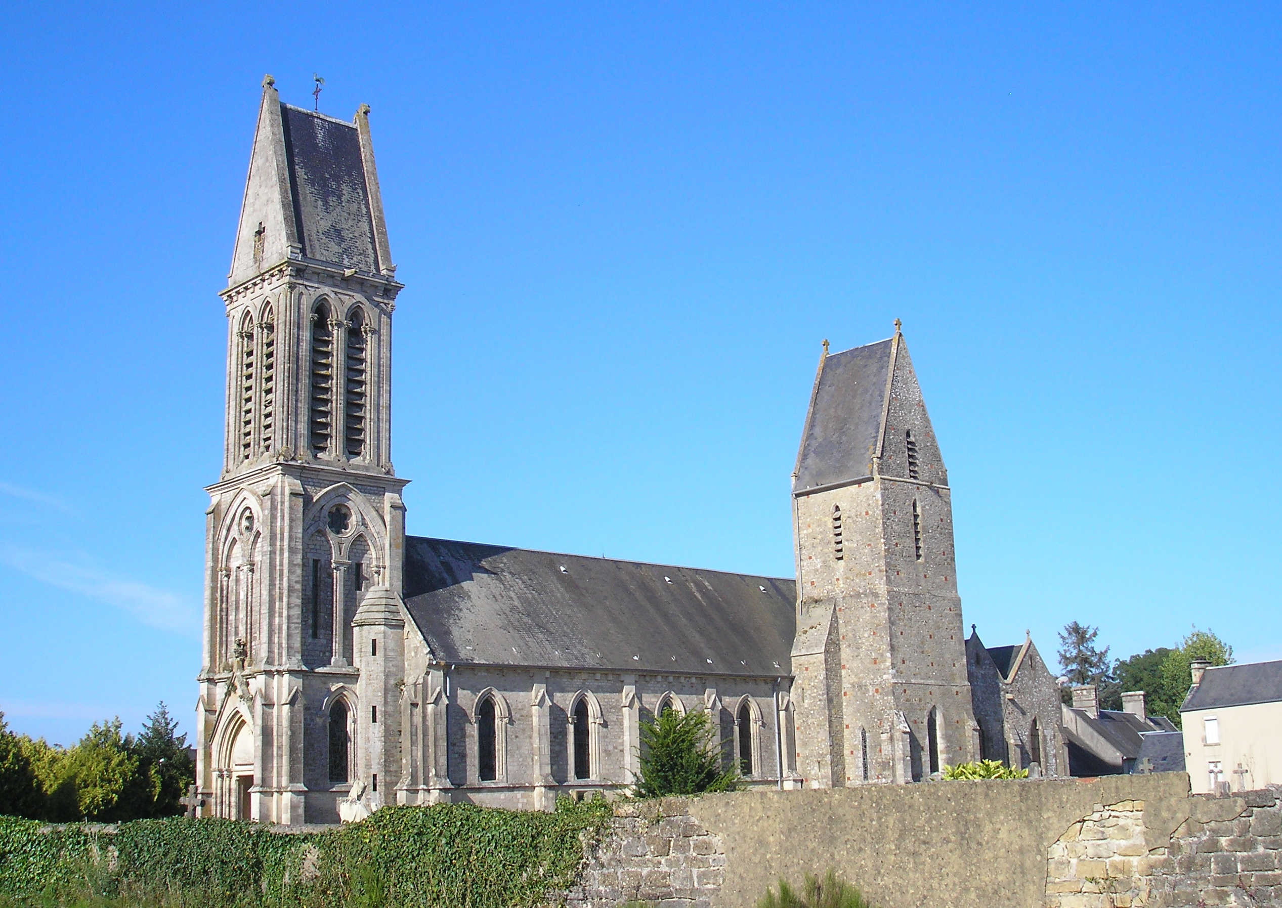 Saint-Jores (Normandie, France). L'église Saint-Georges.